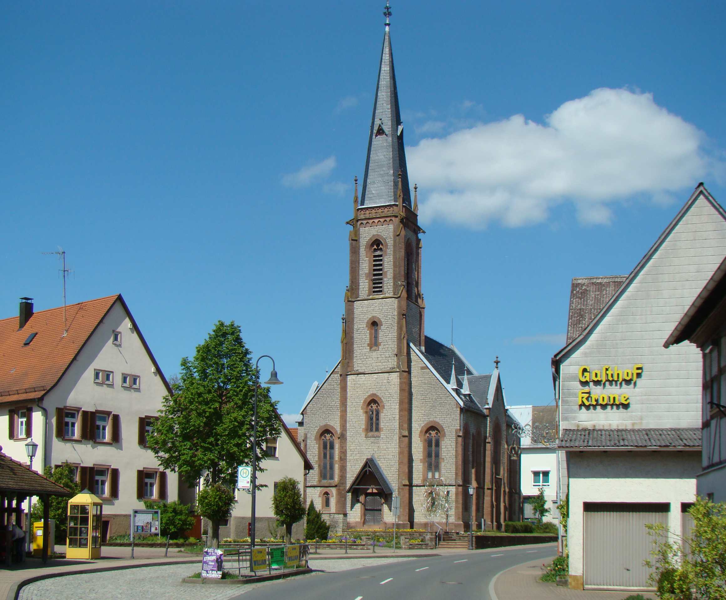 Oberschefflenz, evang. Kirche